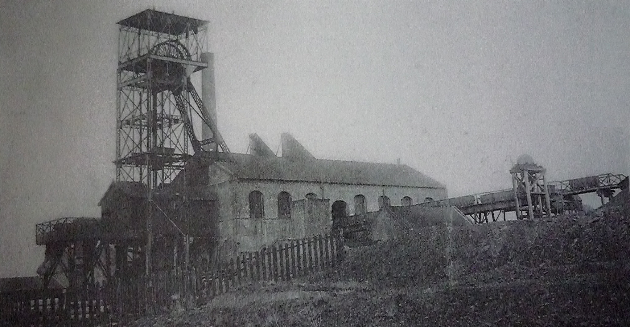 La Fosse de Saint-Saulve de la Compagnie des mines de Marly était un charbonnage constitué d'un seul puits situé à Saint-Saulve, Nord, Nord-Pas-de-Calais, France.